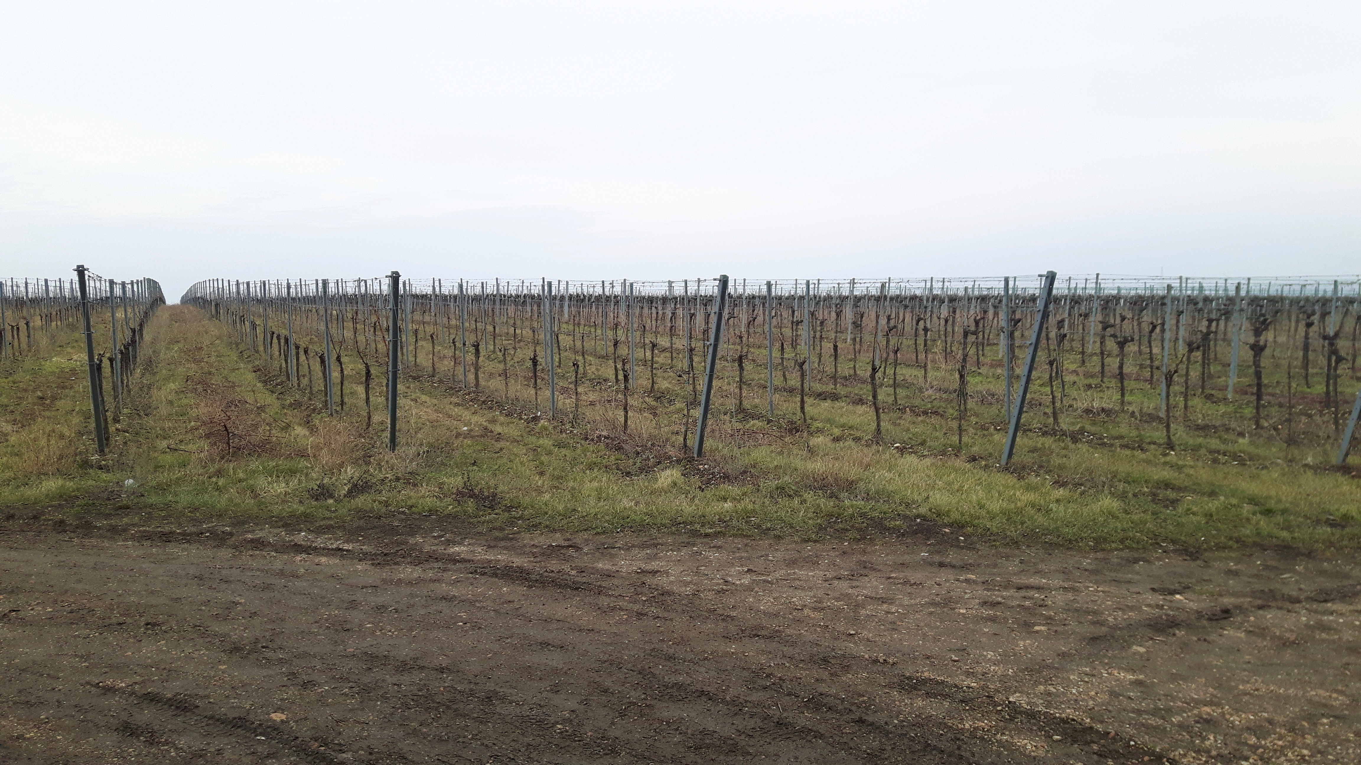 Riede Goldberg in Wien-Oberlaa.